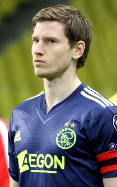 Jan Vertonghen